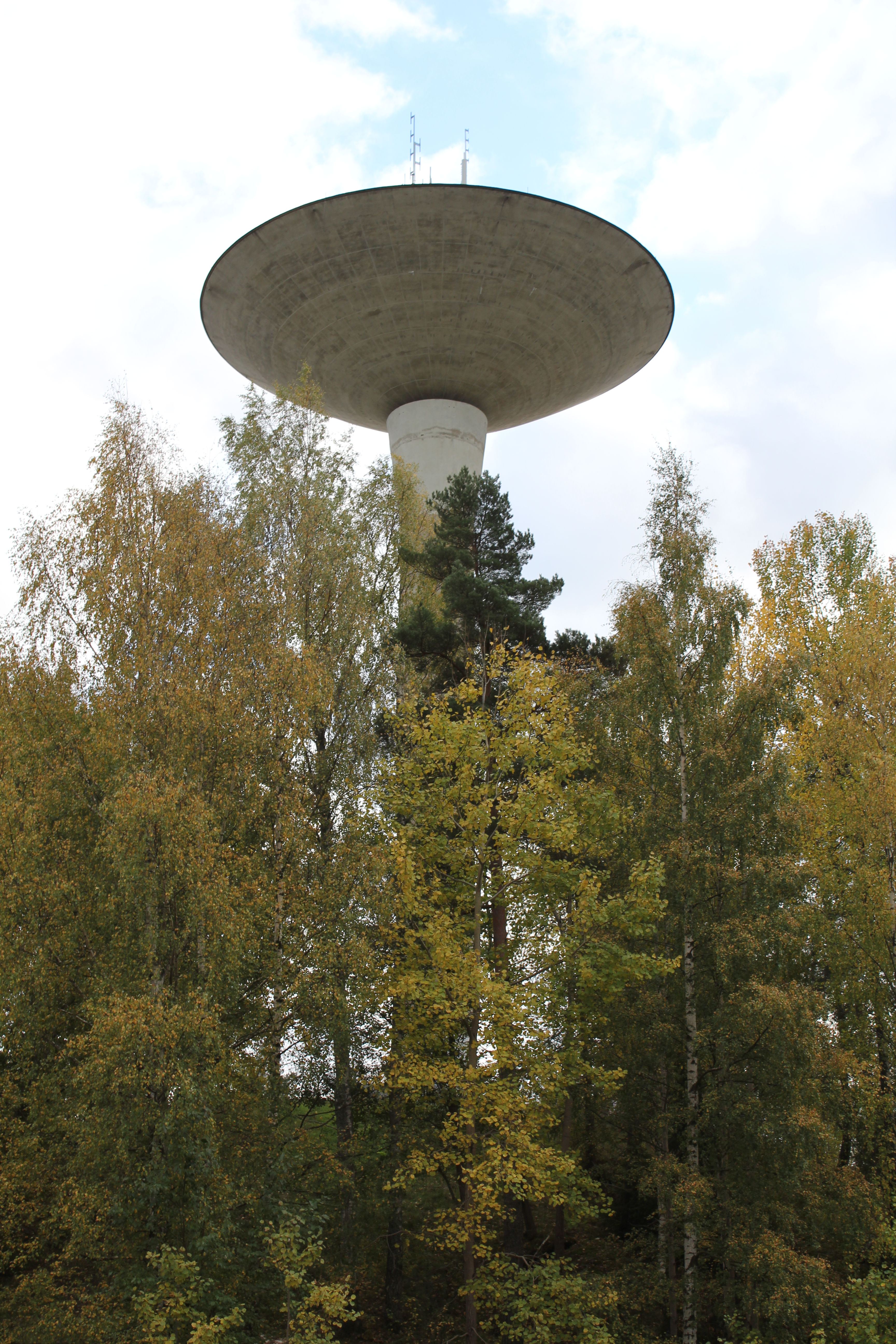 Vattentornet i Storvreten, Botkyrka kommun.